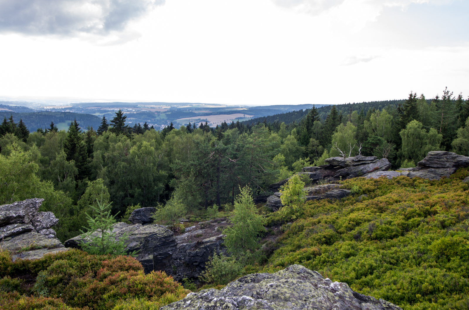 Přírodní památka Vysoký kámen, Krušné hory, okres Sokolov